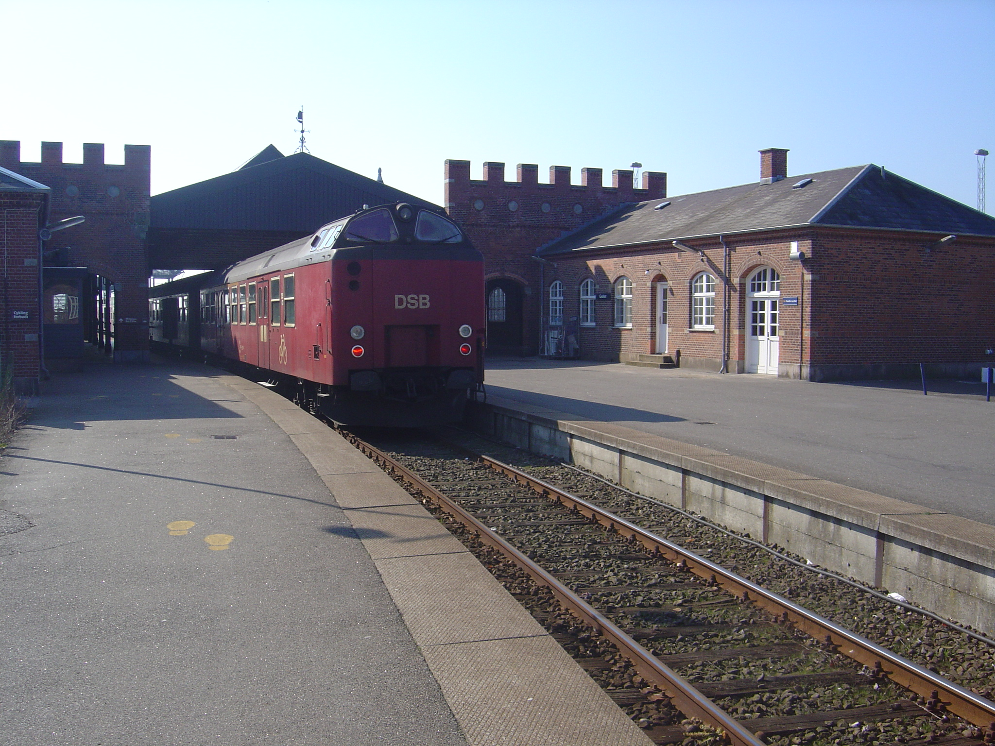 Gedser Station